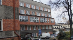 NZOZ Szpital Specjalistyczny MEDHOLDING S.A., ul. Strzelecka 9